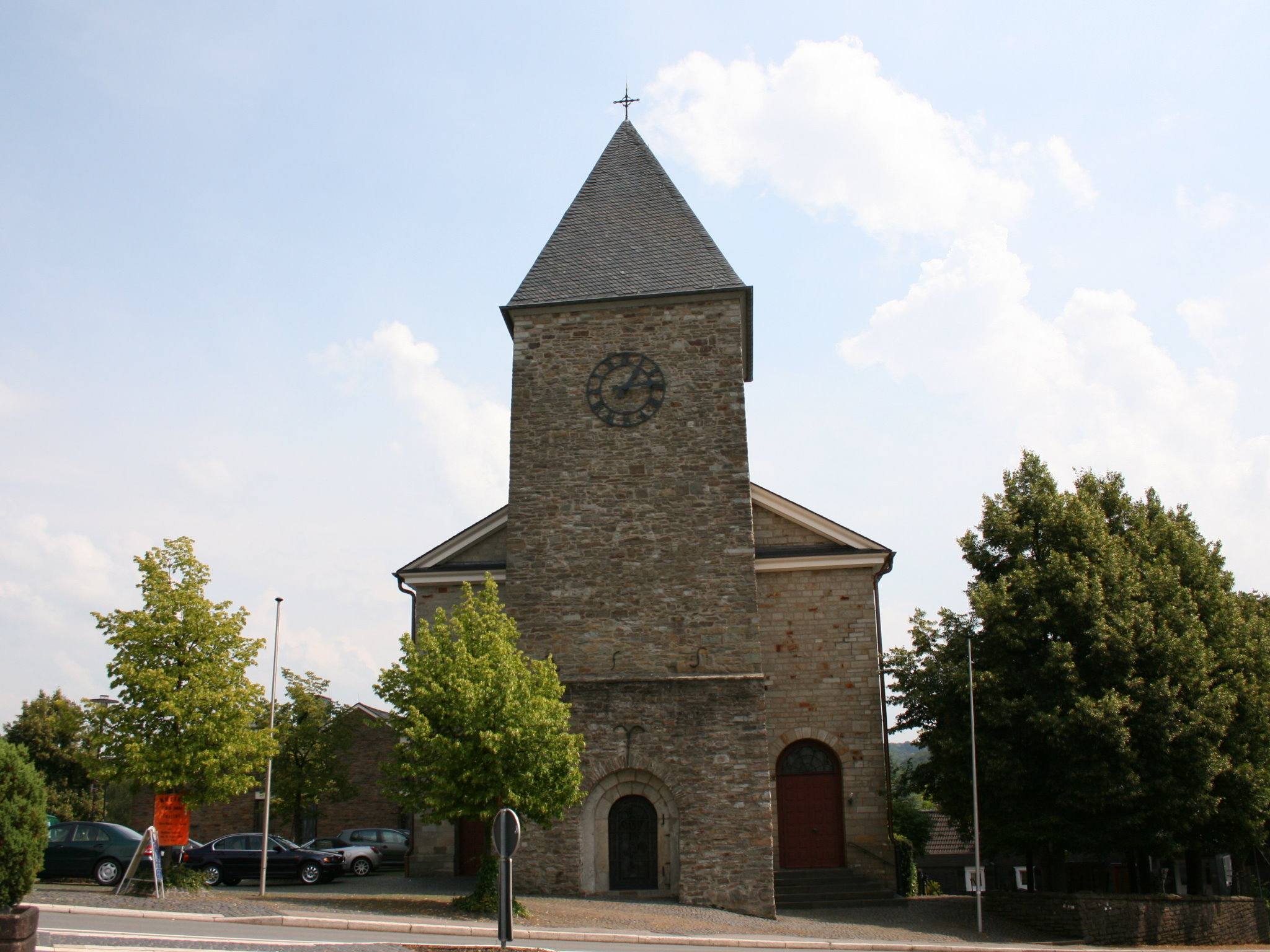 Sankt Johannes Baptist in Kürten